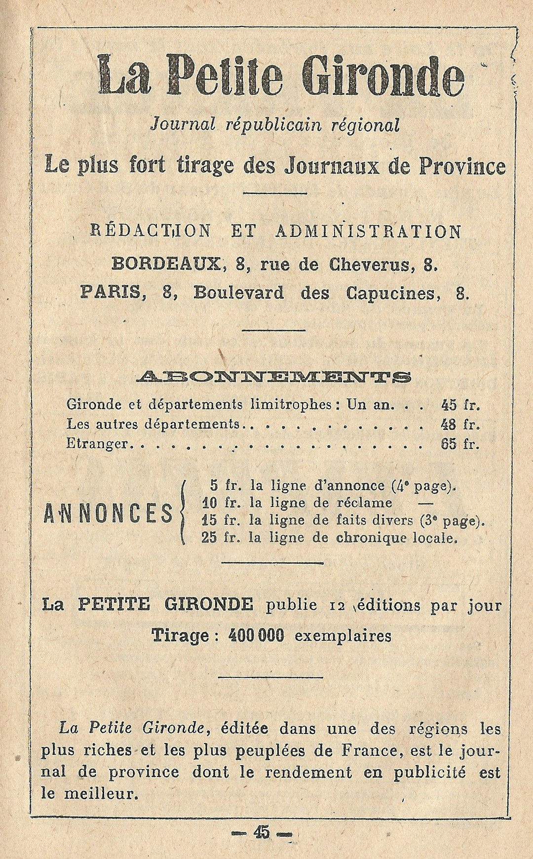 Vignette de réclame pour un journal français : La Petite Gironde